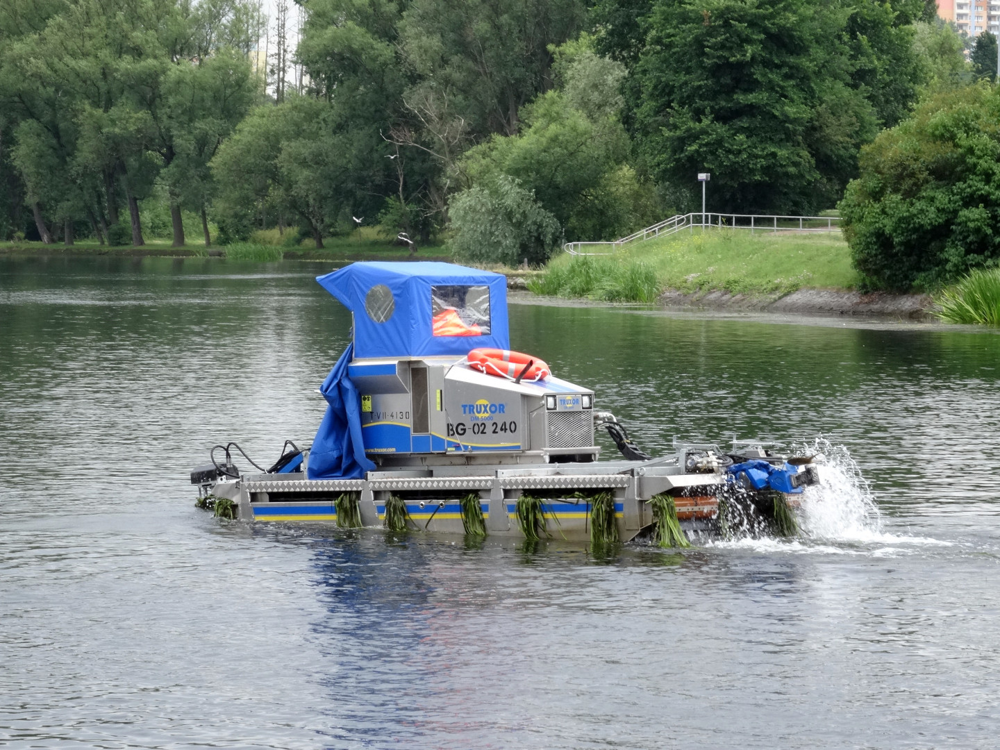 Kosiarka roślinności widnej na Brdzie w Bydgoszczy